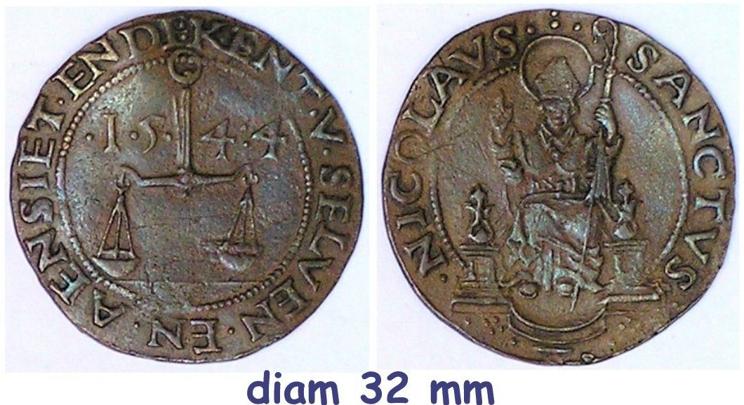 Gildepenning, Antwerpen, merceniers 1544. Foto van eigen exemplaar.